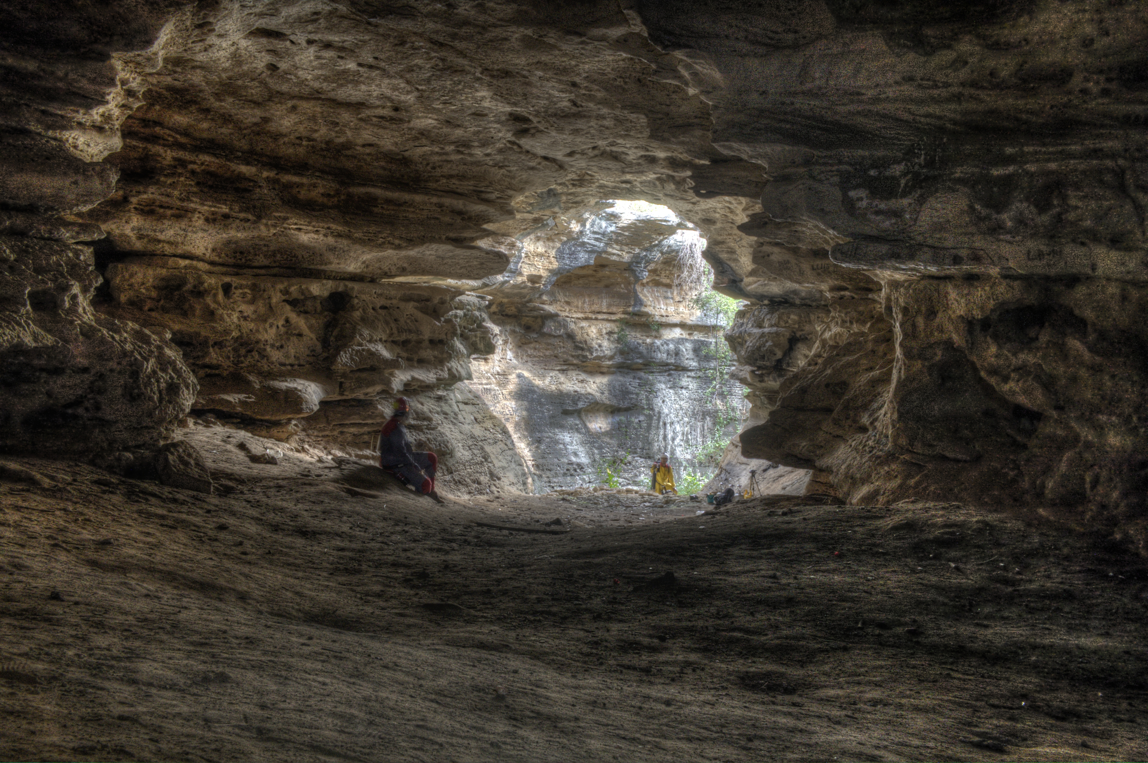 Salão da entrada principal da Furna Feia, caverna objeto da criação do Parque Nacional da Furna Feia.